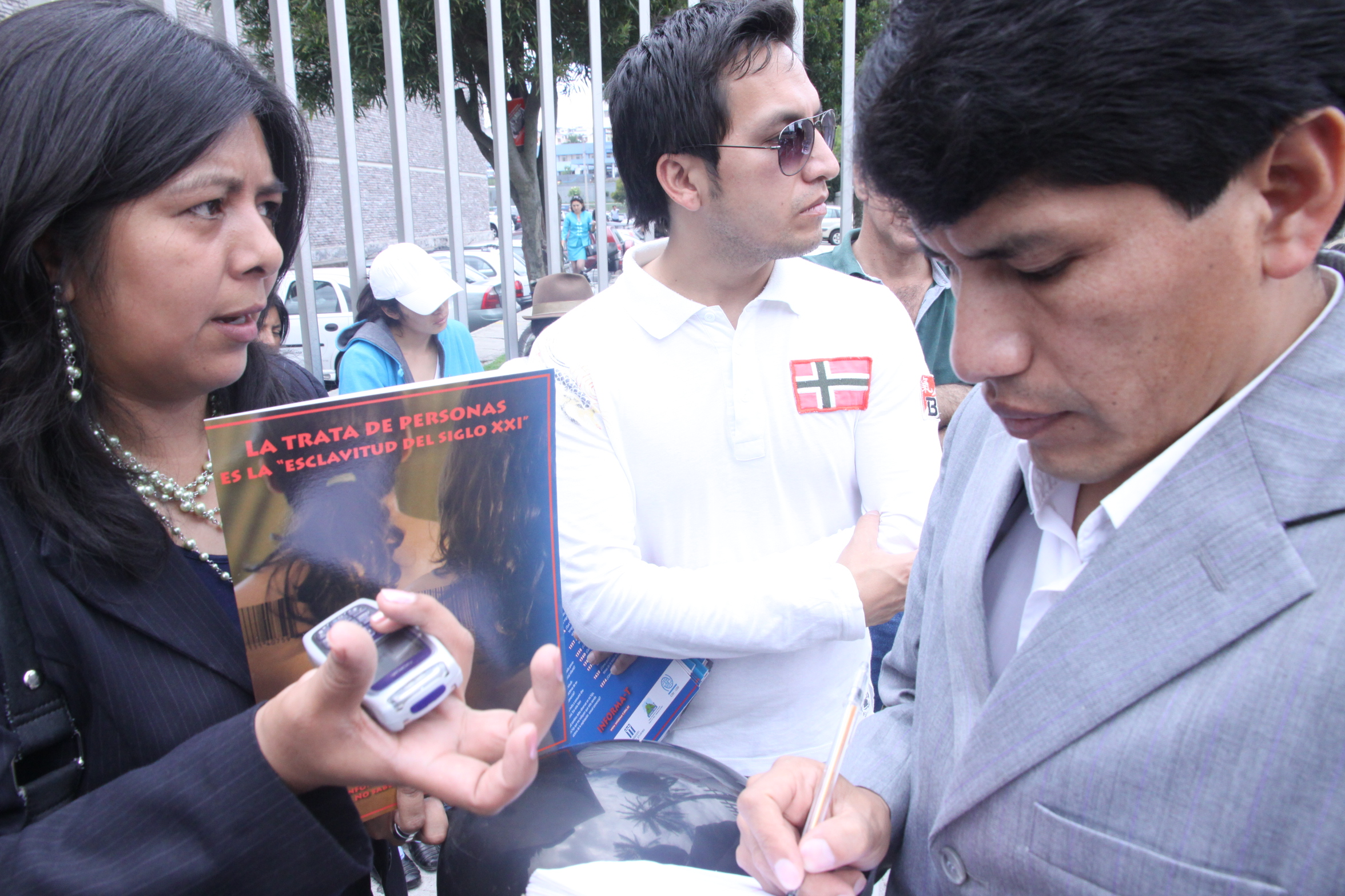 21 de Abril de 2010